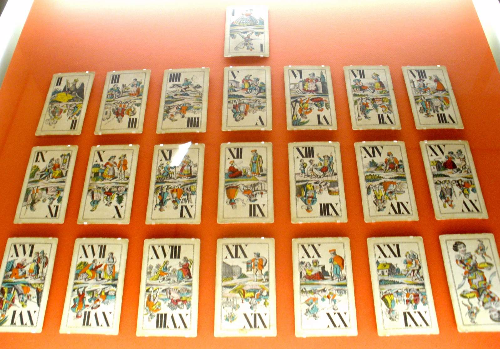 Bibat Museo Fournier de Naipes de Álava (Vitoria-Gasteiz) Tarocks of the Austrian Tarock (Industrie und Glück) Type A pattern.